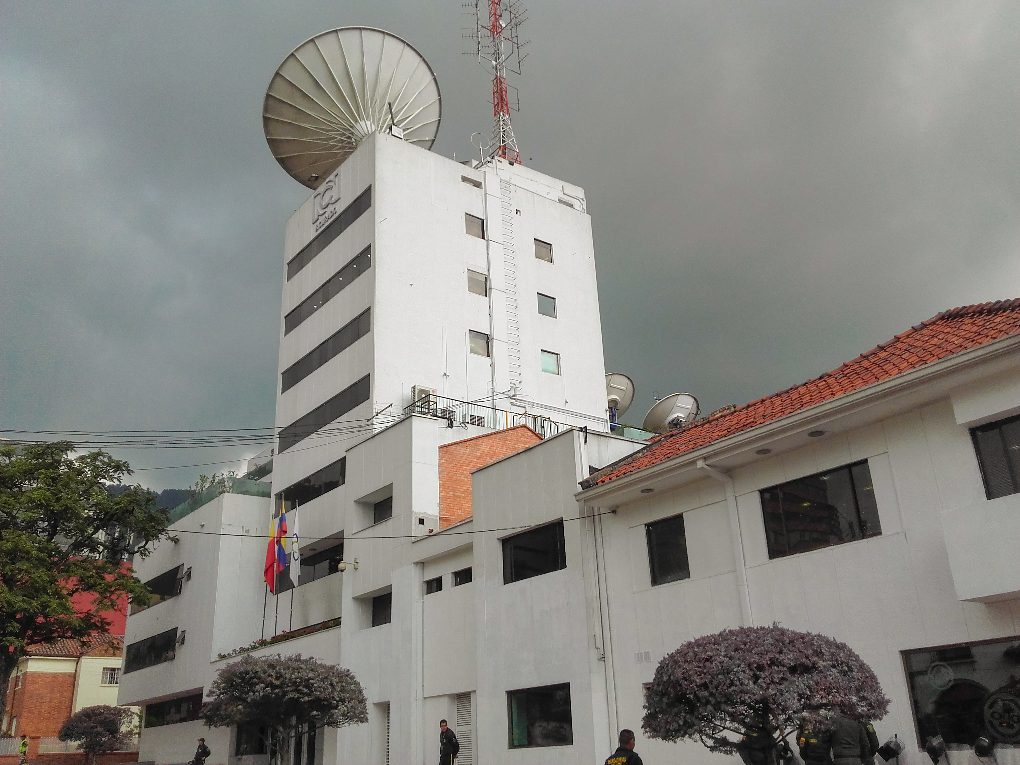 dnfngngngkgkfl